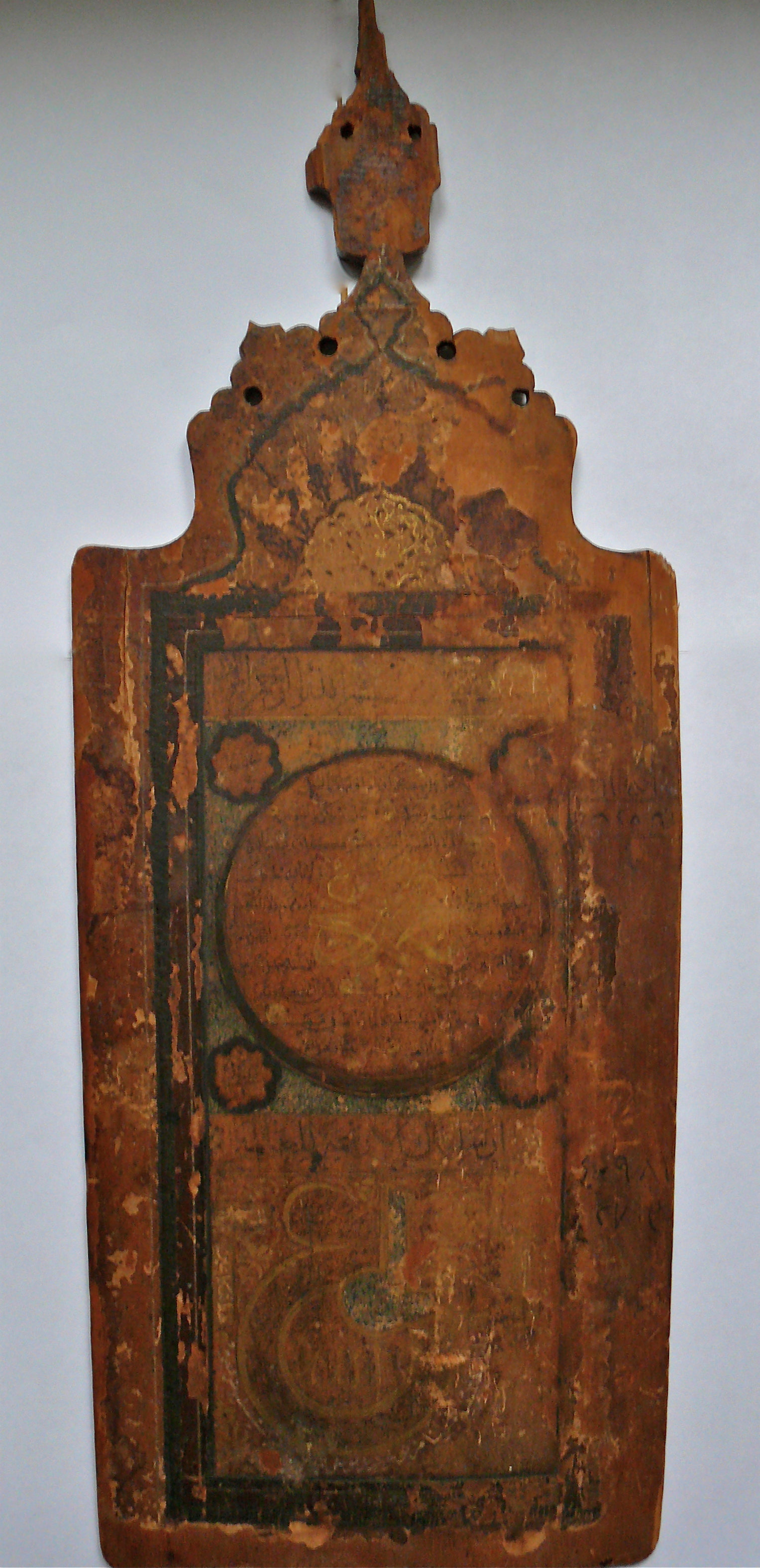 Hilya. Islamische (osmanische) Kalligraphie